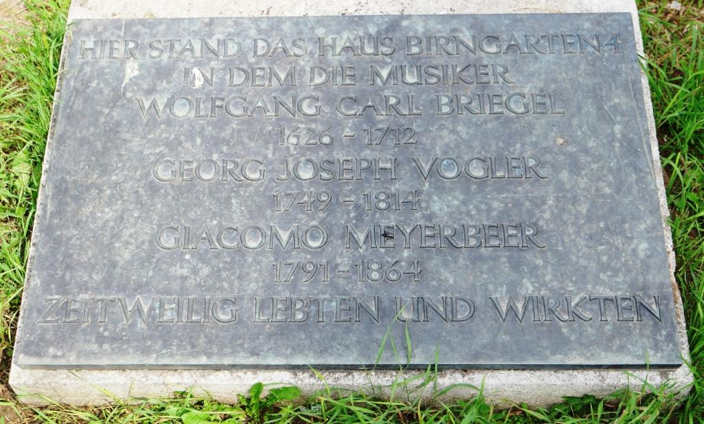 Gedenkplatte für den Komponisten Wolfgang Carl Briegel (1626-1712) in Darmstadt, Karolinenplatz